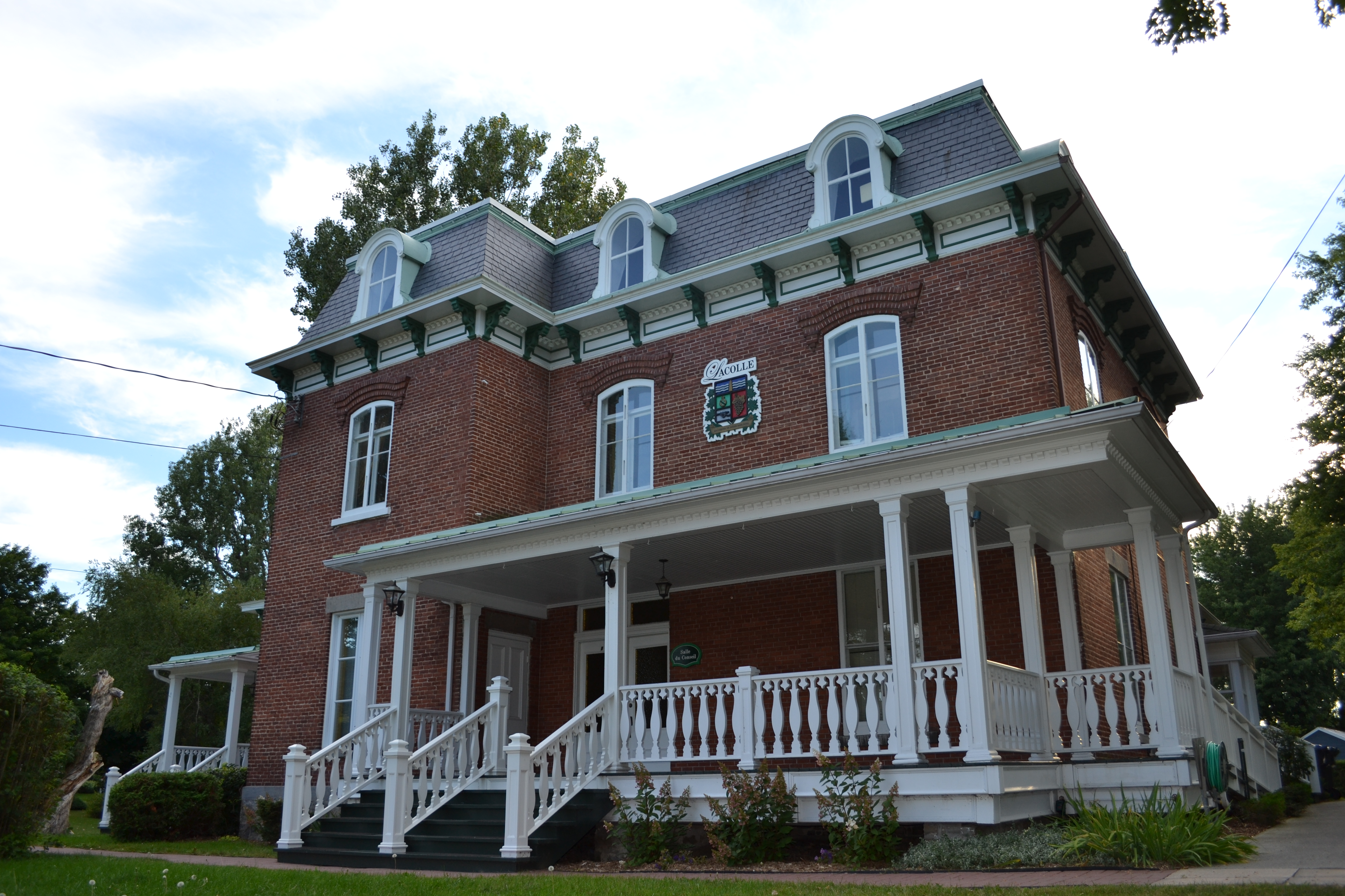 L'édifice du 1, rue de l'Église Sud, actuellement la mairie de Lacolle, est une résidence d'influence Second Empire construite à la fin du XIXe siècle.